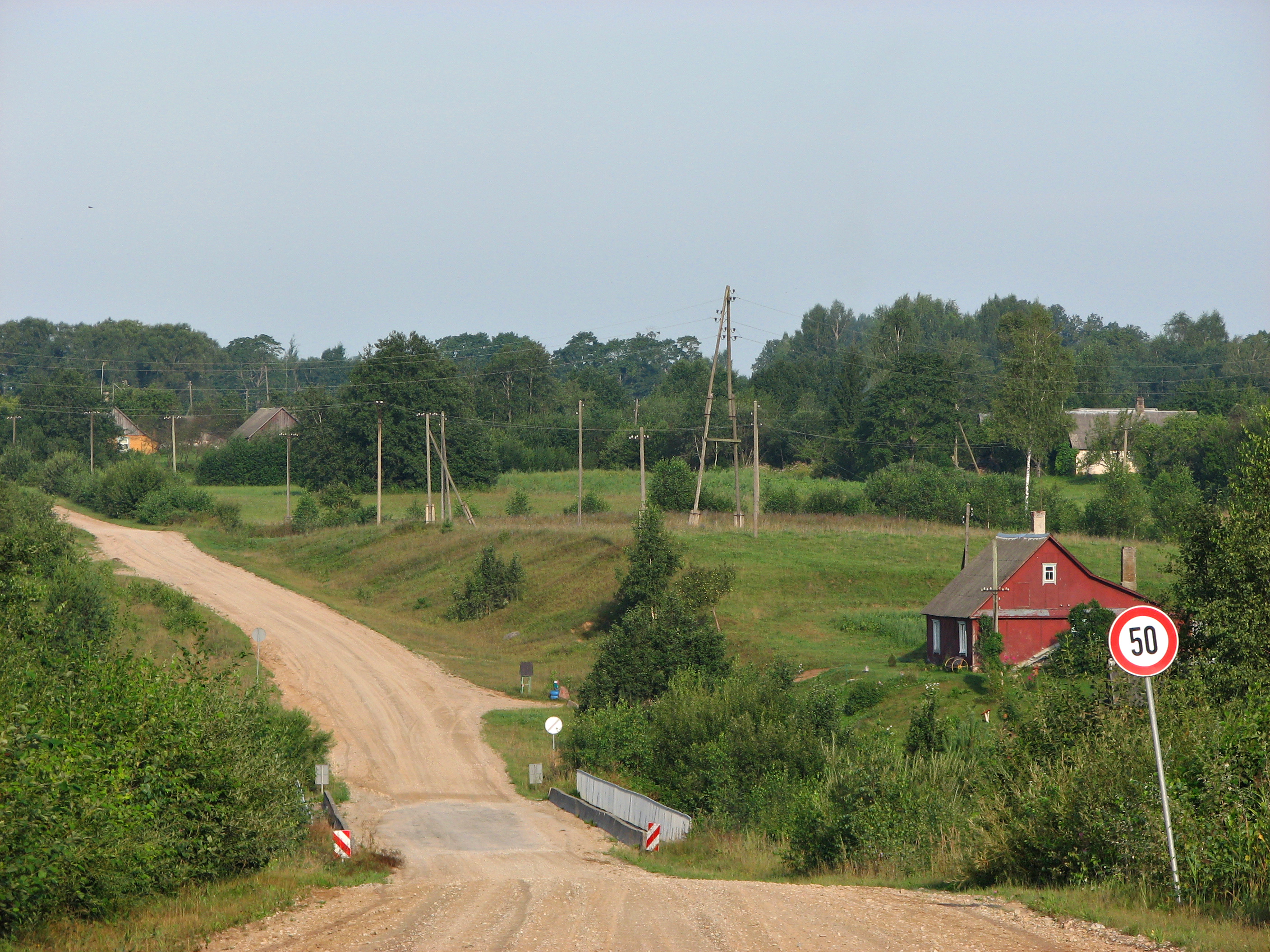 возле моста